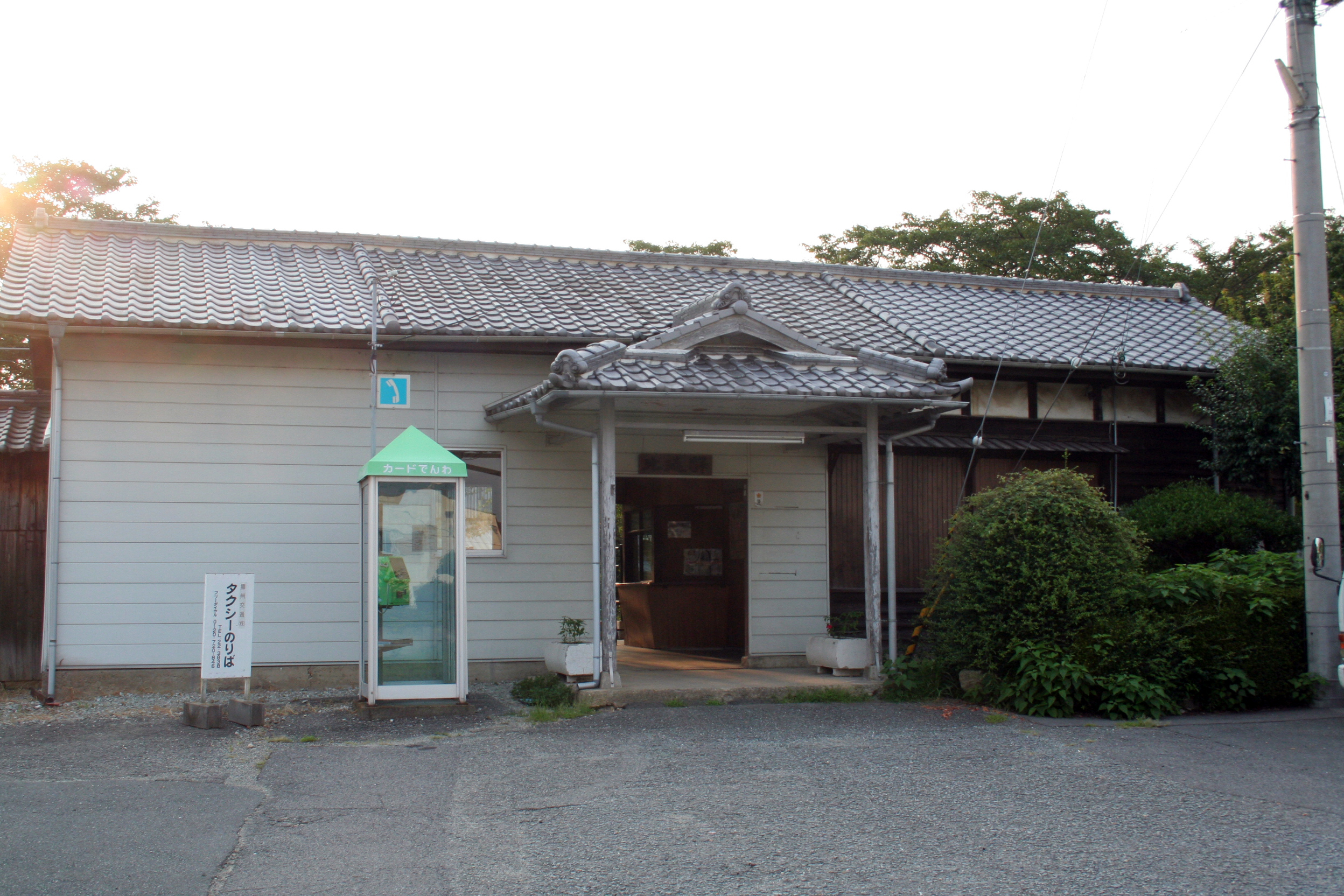 比延駅とその周辺の風景。夕刻時に撮影。 比延駅の駅舎。